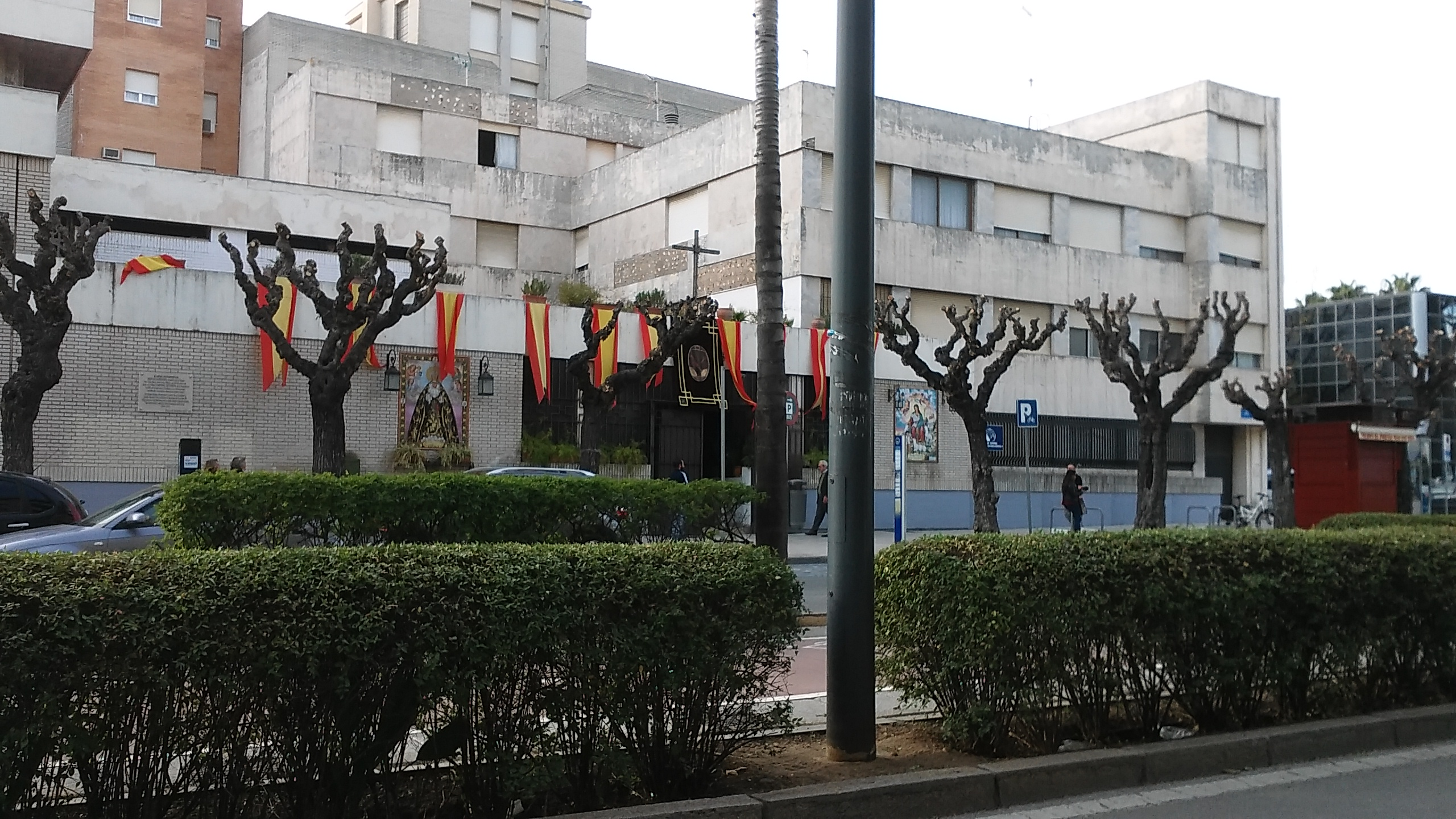 portada del convento de Capuchinos en Jerez de la Frontera, España